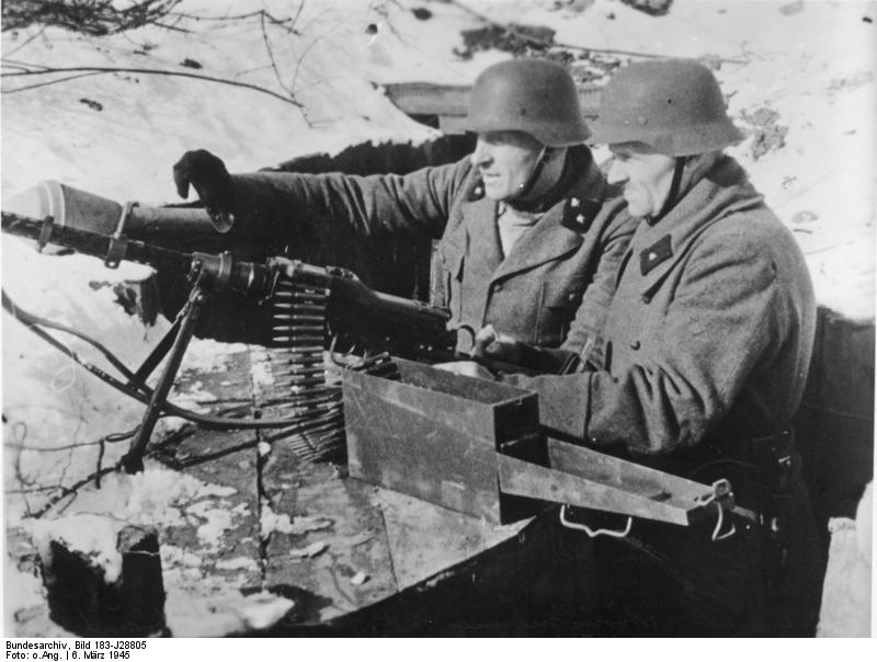 ADN-ZB II. Weltkrieg 1939-45 Deutsch-sowjetische Front, Ostpreußen Anfang März 1945: In dem von den deutschen Faschisten zur Festung erklärten Königsberg. Diese Volkssturmmänner aus Hitlers letztem Aufgebot sollten die Stadt verteidigen helfen. Am 9.4.1945 mußte Königsberg kapitulieren. (Aufnahme 6.3.1945) [Scherl Bilderdienst]